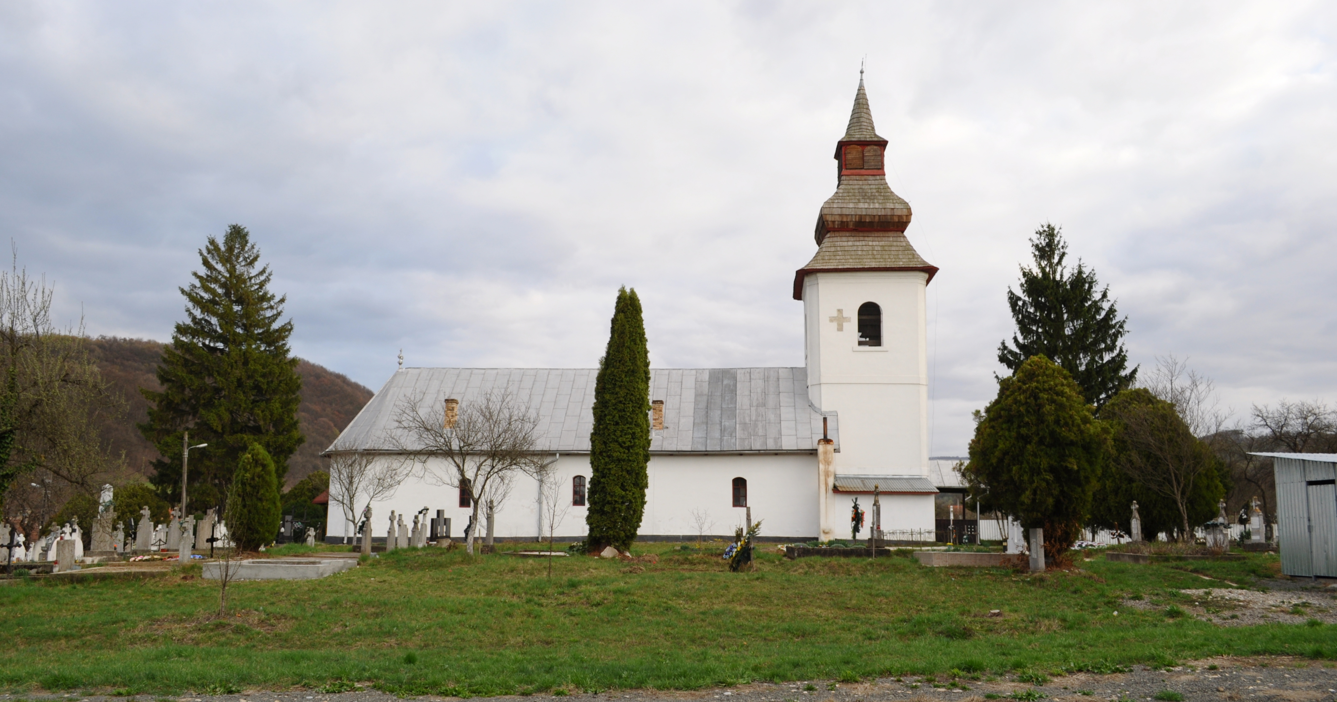 Biserica "Cuvioasa Paraschiva", sat LĂPUŞNIC; comuna DOBRA